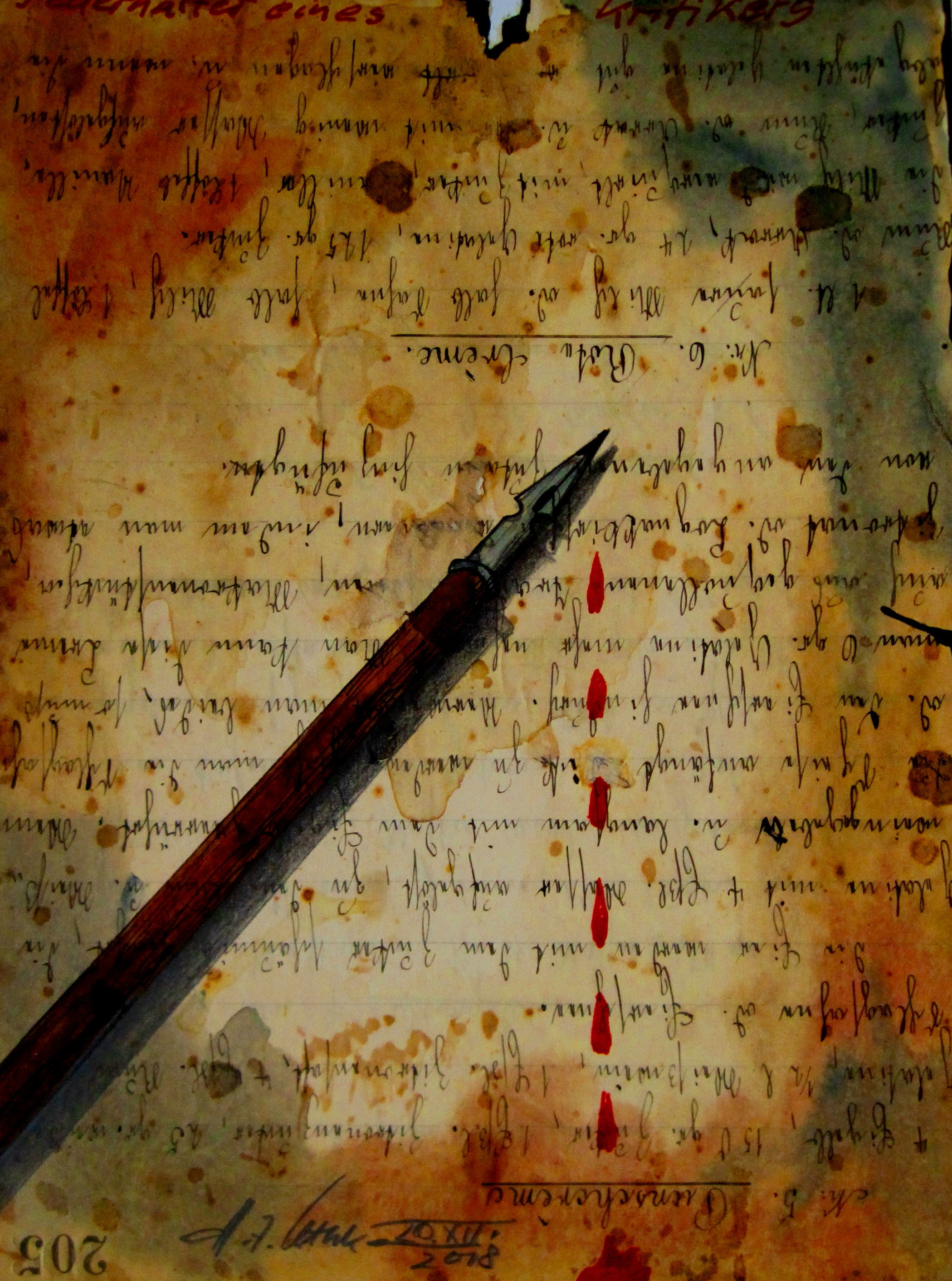 Federhalter eines Kritikers, 2018,Collage, Aquarell, Tusche, Farbstift